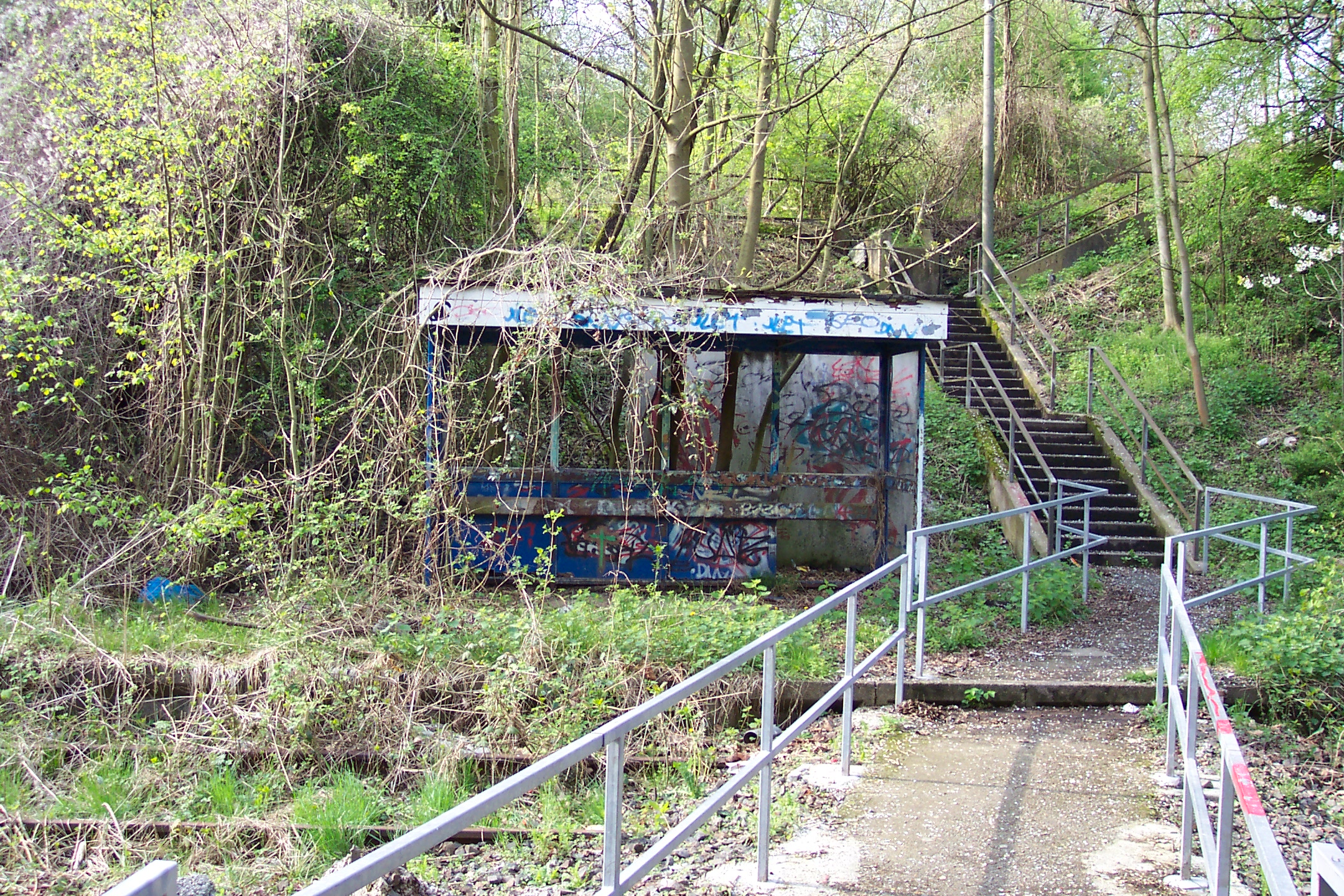 Der Eulenkopfweg, Wuppertal